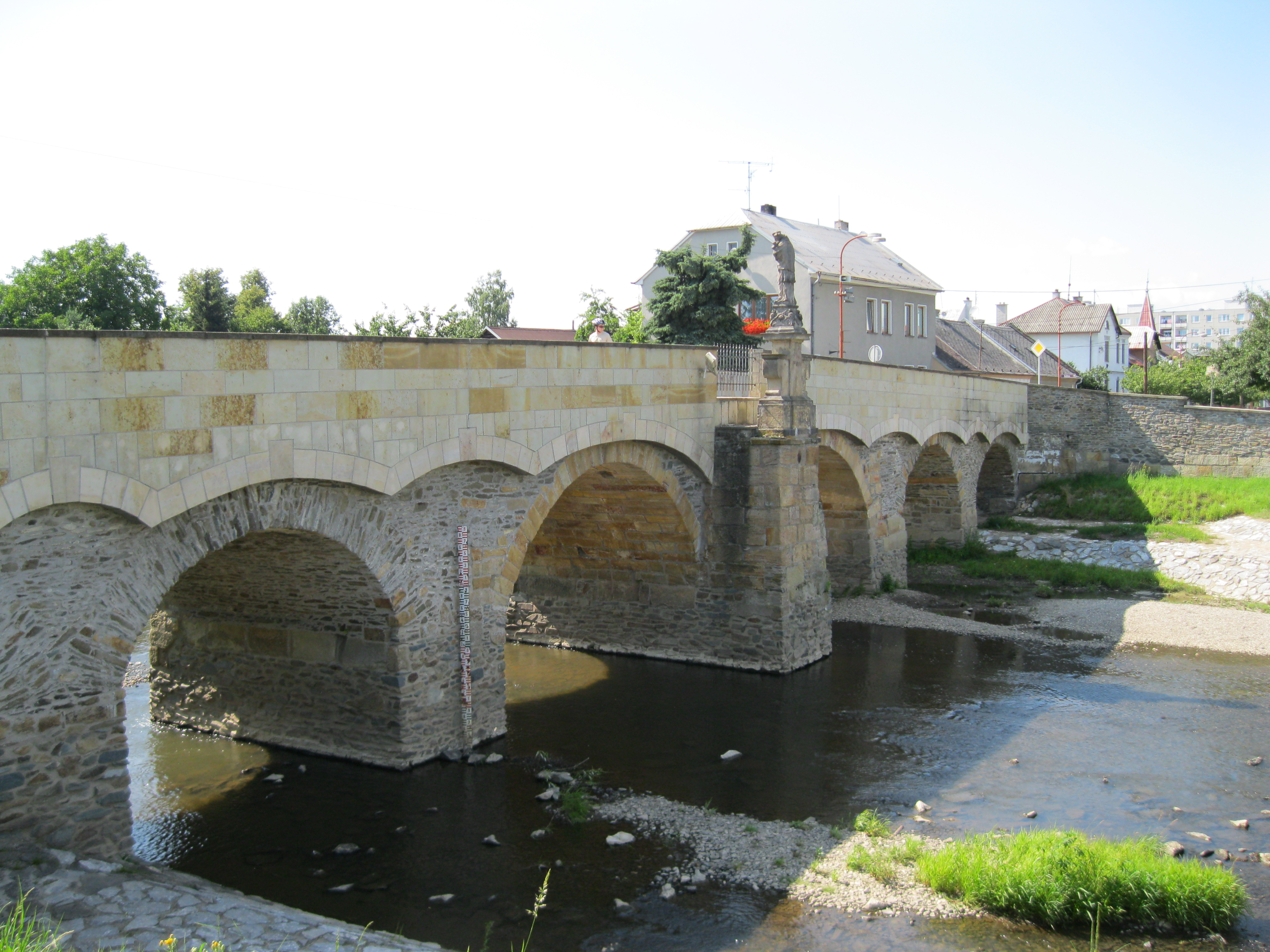 Silniční most se sochou sv. Jana Nepomuckého (Litovel)